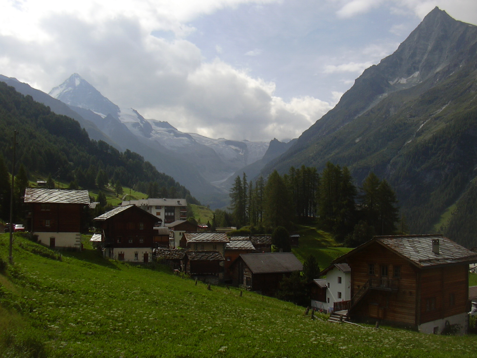 La Forclaz (1700 m), above Les Haudères, Val d'Hérens, Valais/Switzerland